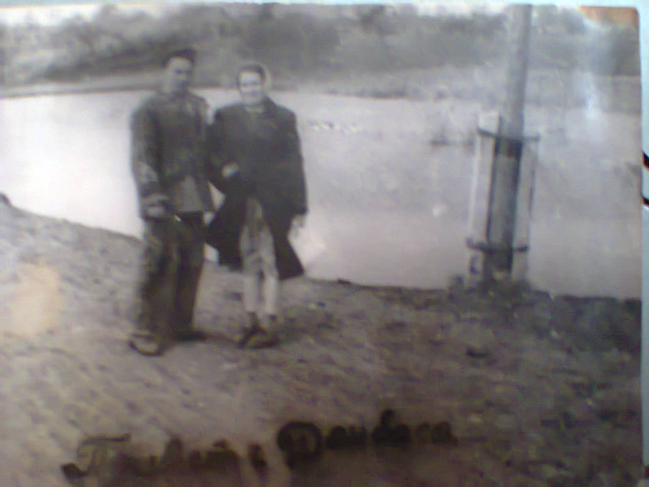 Сім'я з Київської області , Шполянського району яка приїхала під час голоду 1947 на заробідки в Донбас